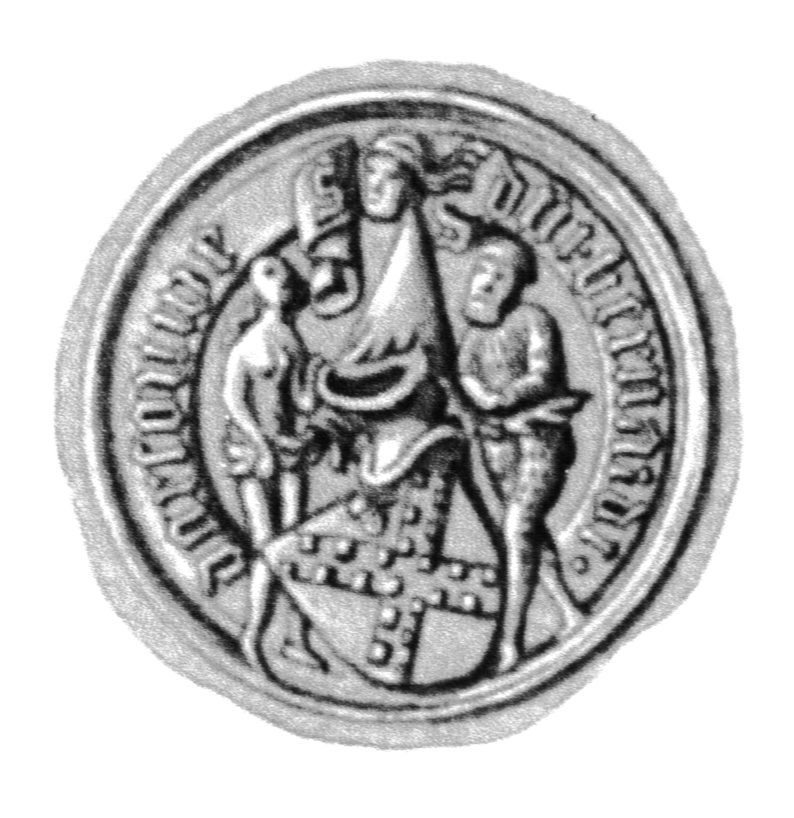 Siegel des Ratsmannes Bernd Darsouwe. Das Siegel stammt aus der Zeit um 1476. Siehe Emil Ferdinand Fehling: Lübeckische Ratslinie, Nr. 545 (Bernhard Darsow).